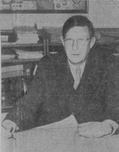 Arkitekten Nils A. Blanck